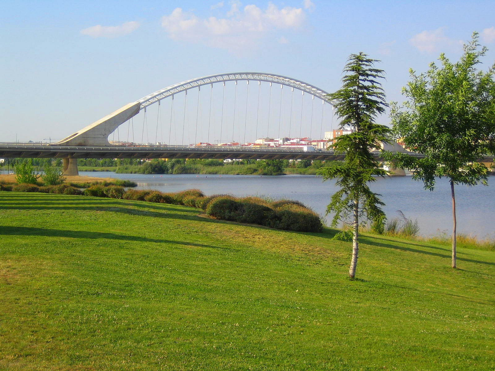 El puente Lusitania de Mérida - arquitecto Santiago Calatrava